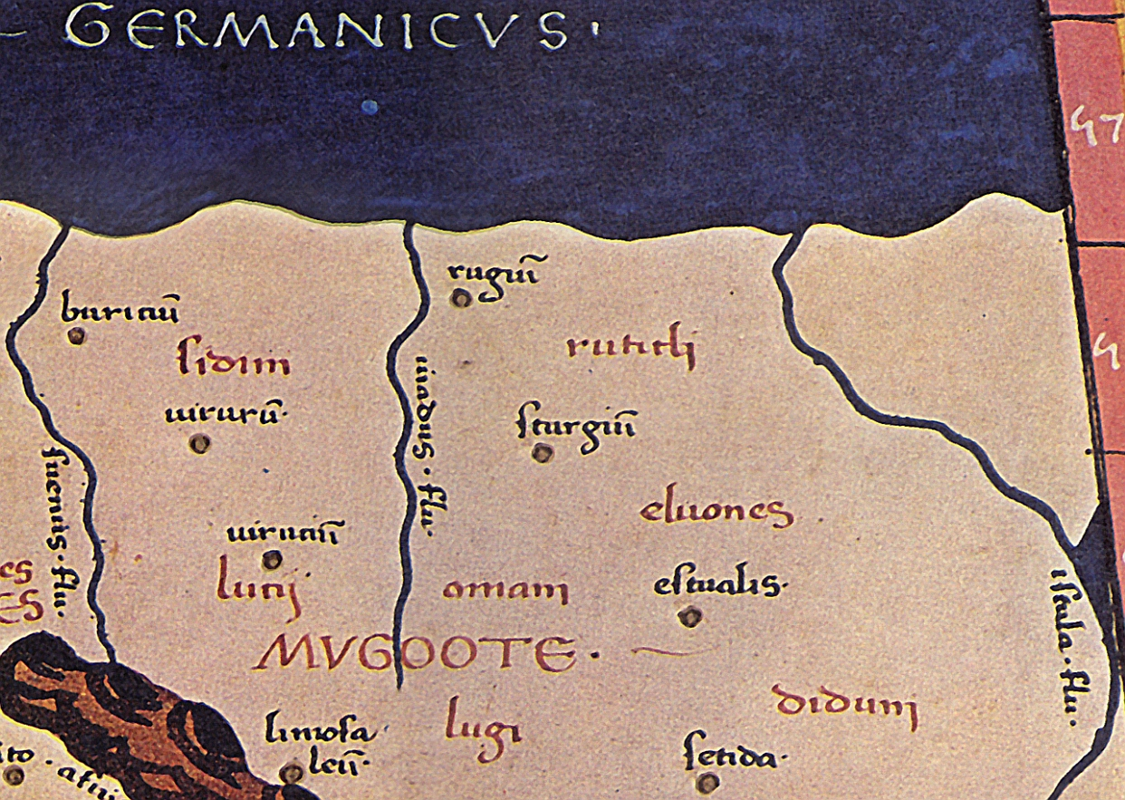 Der Ortsname "SKOURGON" (hier scurgiŭ), Detailbild von der Karte zur Germania magna.